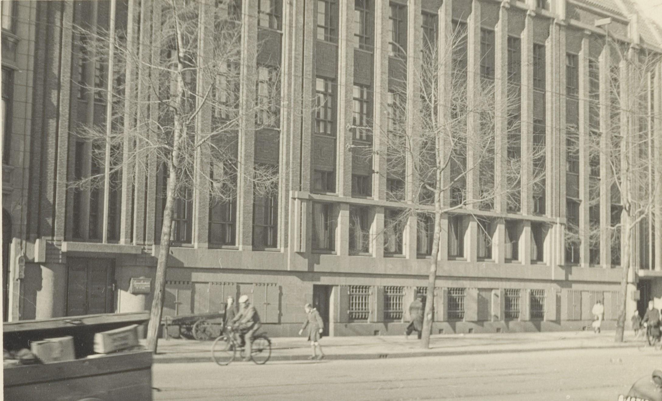 Exterieur van het gebouw van de bank Lippmann Rosenthal & Co. (Liro-bank), voorheen bijkantoor van de Amsterdamsche Bank, Sarphatistraat 47-55.